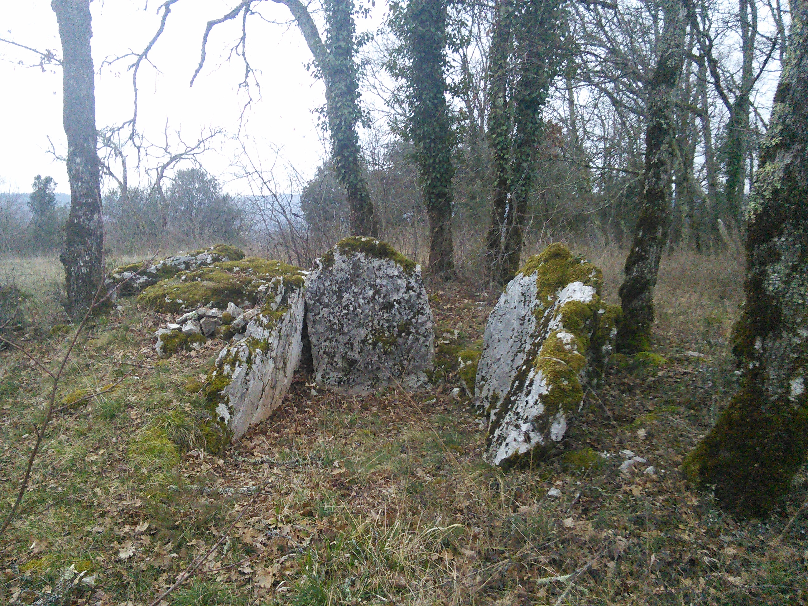 a